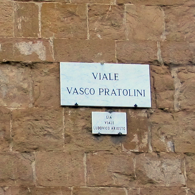 Bellosguardo, Firenze